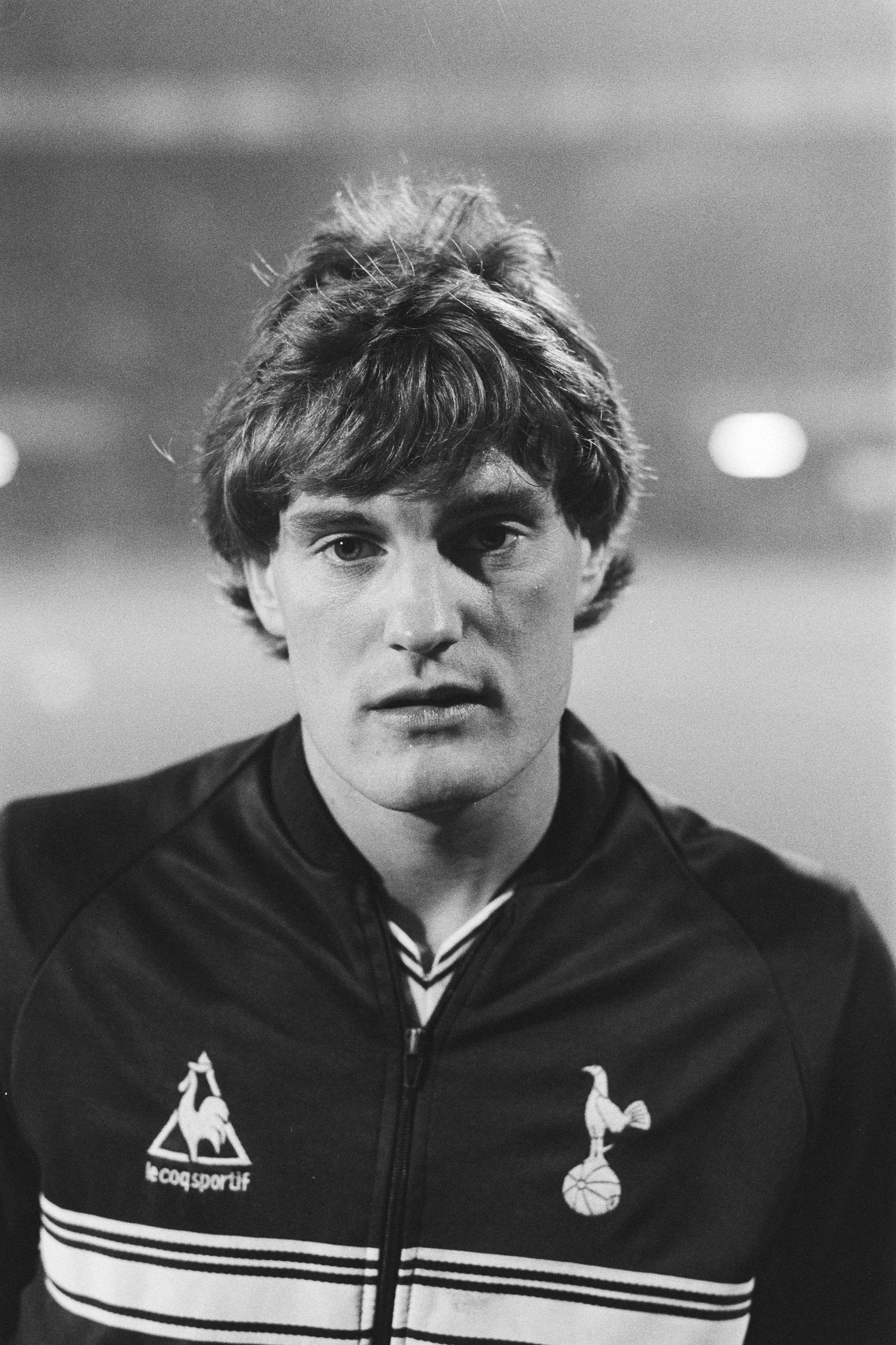 Collectie / Archief : Fotocollectie Anefo Reportage / Serie : Feyenoord tegen Tottenham Hotspur 0-2, Europacup III Beschrijving : Glenn Hoddle van Tottenham Hotspur Datum : 2 november 1983 Locatie : Rotterdam, Zuid-Holland Trefwoorden : portretten, voetballers Persoonsnaam : Hoddle, Glenn Instellingsnaam : Feyenoord, Tottenham Hotspur Fotograaf : Antonisse, Marcel / Anefo Auteursrechthebbende : Nationaal Archief Materiaalsoort : Negatief (zwart/wit) Nummer archiefinventaris : bekijk toegang 2.24.01.05 Bestanddeelnummer : 932-7577